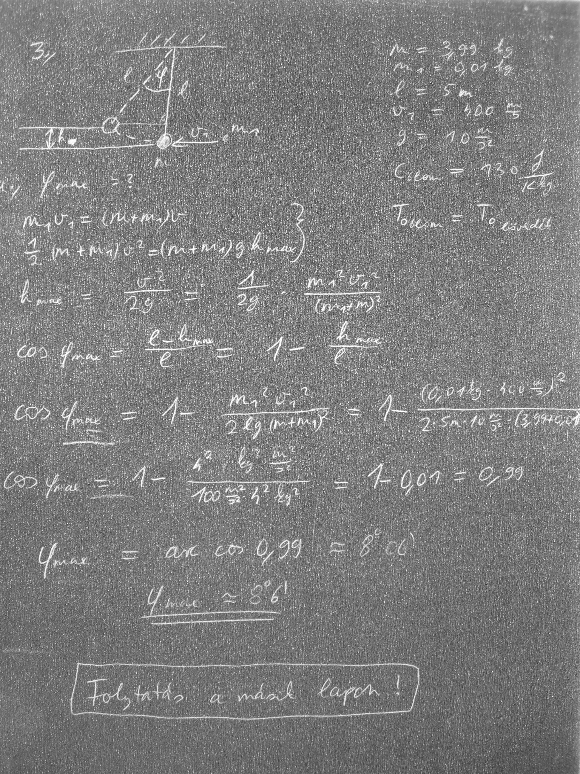 Központi (összevont) érettségi-felvételi vizsgához használt kétpéldányos papír indigója. A kép az 1985-ös központi fizikaérettségi egyik feladatmegoldását mutatja